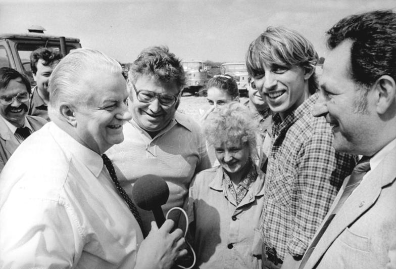 LPG Niederkaina, Besuch von Werner Krolikowski ADN-ZB Häßler 14.7.89 Bez.Dresden: Über den Verlauf der Erntearbeiten informierte sich das Mitglied des Politbüros und Sekretär des ZK der SED Werner Krolikowski (l.) in der LPG Niederkaina. LPG-Vorsitzender Manfred Hubrich (r.) erläuterte die Situation. Janette Kretschmar (3.v.r.) und Agrotechniker Conrad Mirkow (2.v.r.) brachten eigene Erfahrungen mit ein.